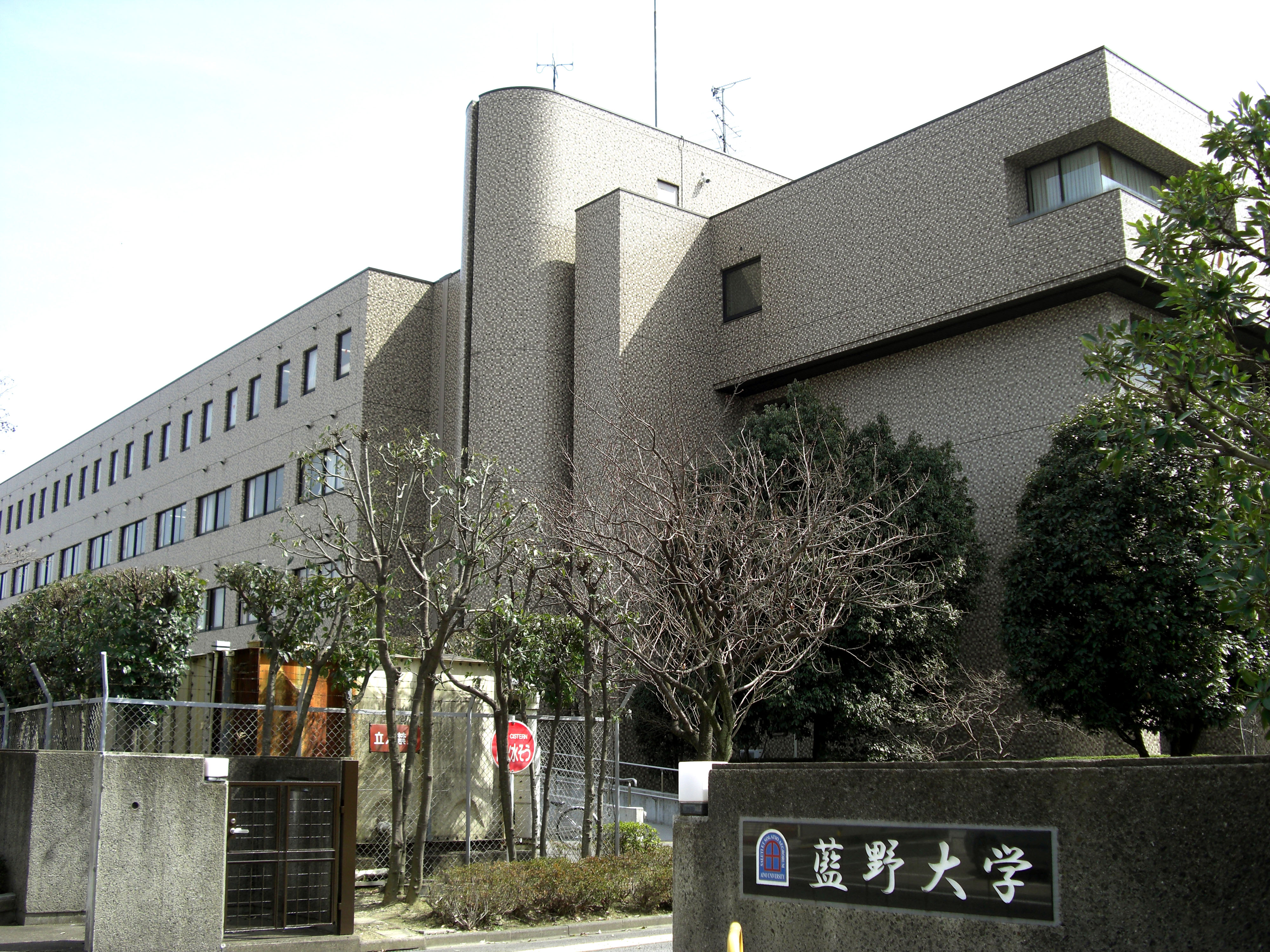 Aino University,Higashioda Ibaraki-City Osaka Japan.